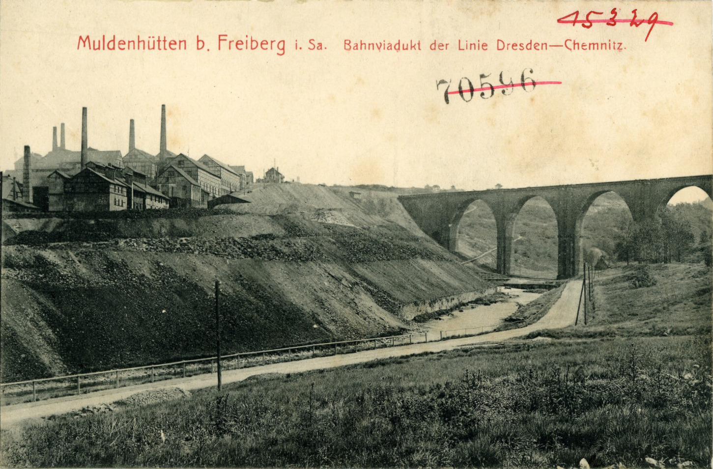 Muldenhütten; Bahnviadukt der Linie Chemnitz-Dresden This postcard is from publisher Brück & Sohn in Meißen ( postcard has a unique number 09126 and is available in a higher resolution at the publisher. This images was uploaded in a cooperation project between Wikipedians and the publisher.